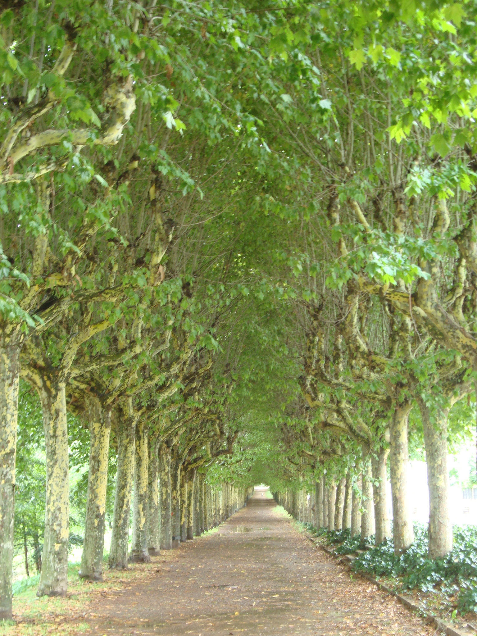 Passeig de Barcelona